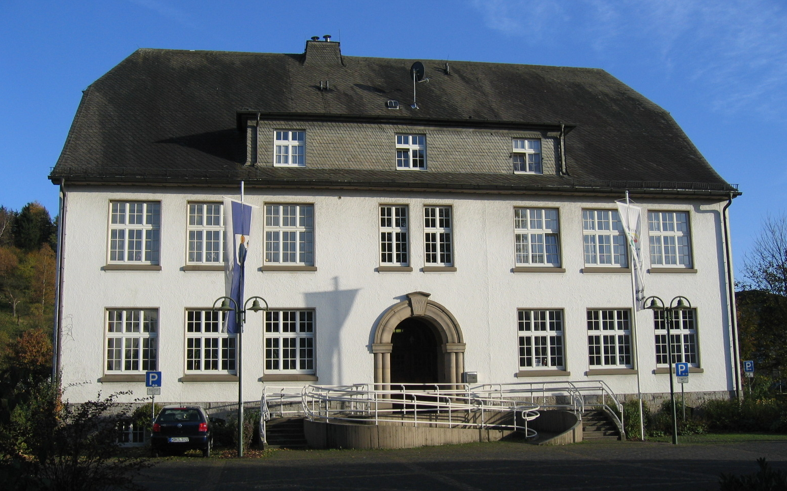 Alte Johannesschule (1911) am Franz-Josef-Tigges-Platz in Sundern